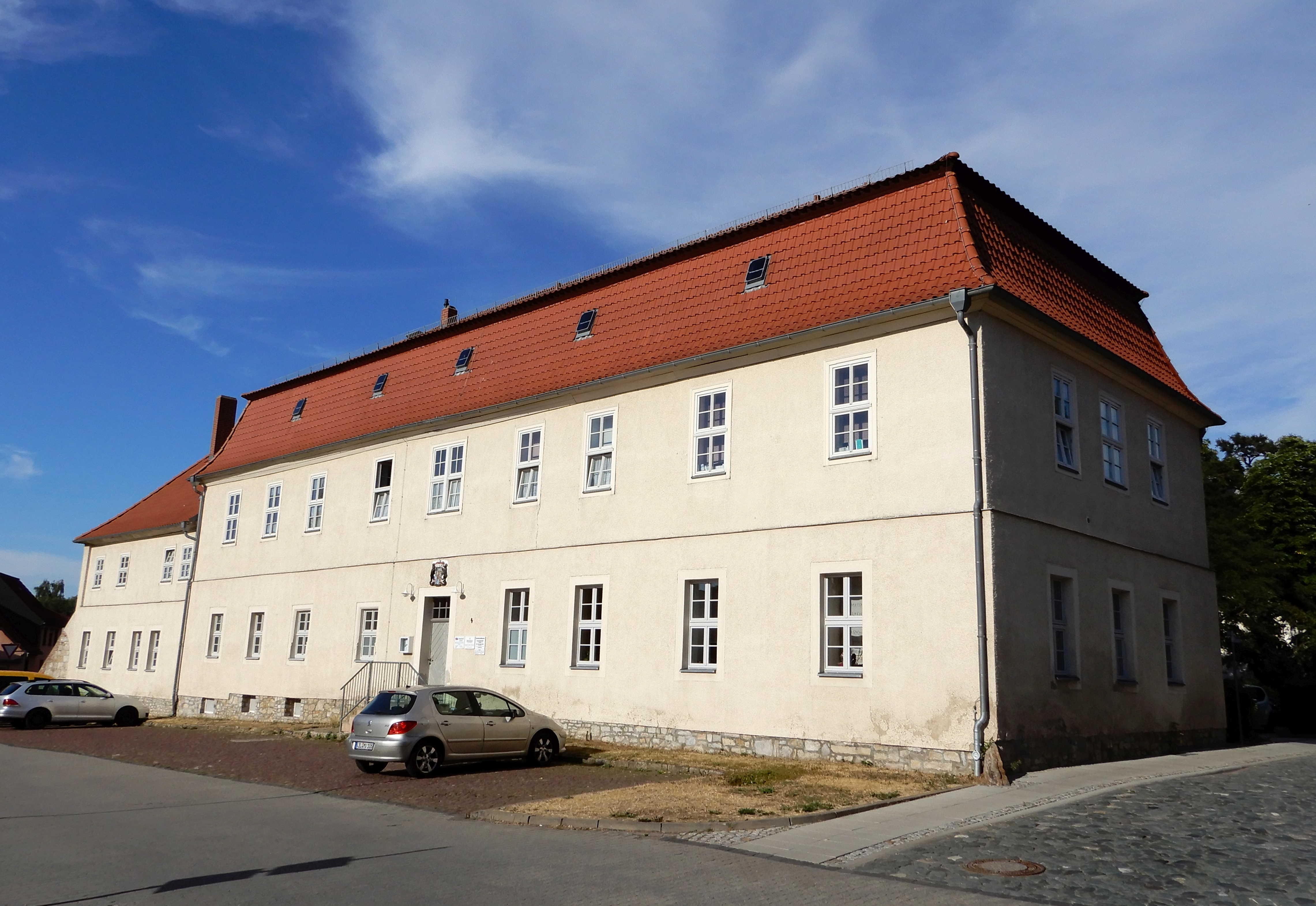 Ehemaliges Verwaltungsgebäude der Domäne Hoym